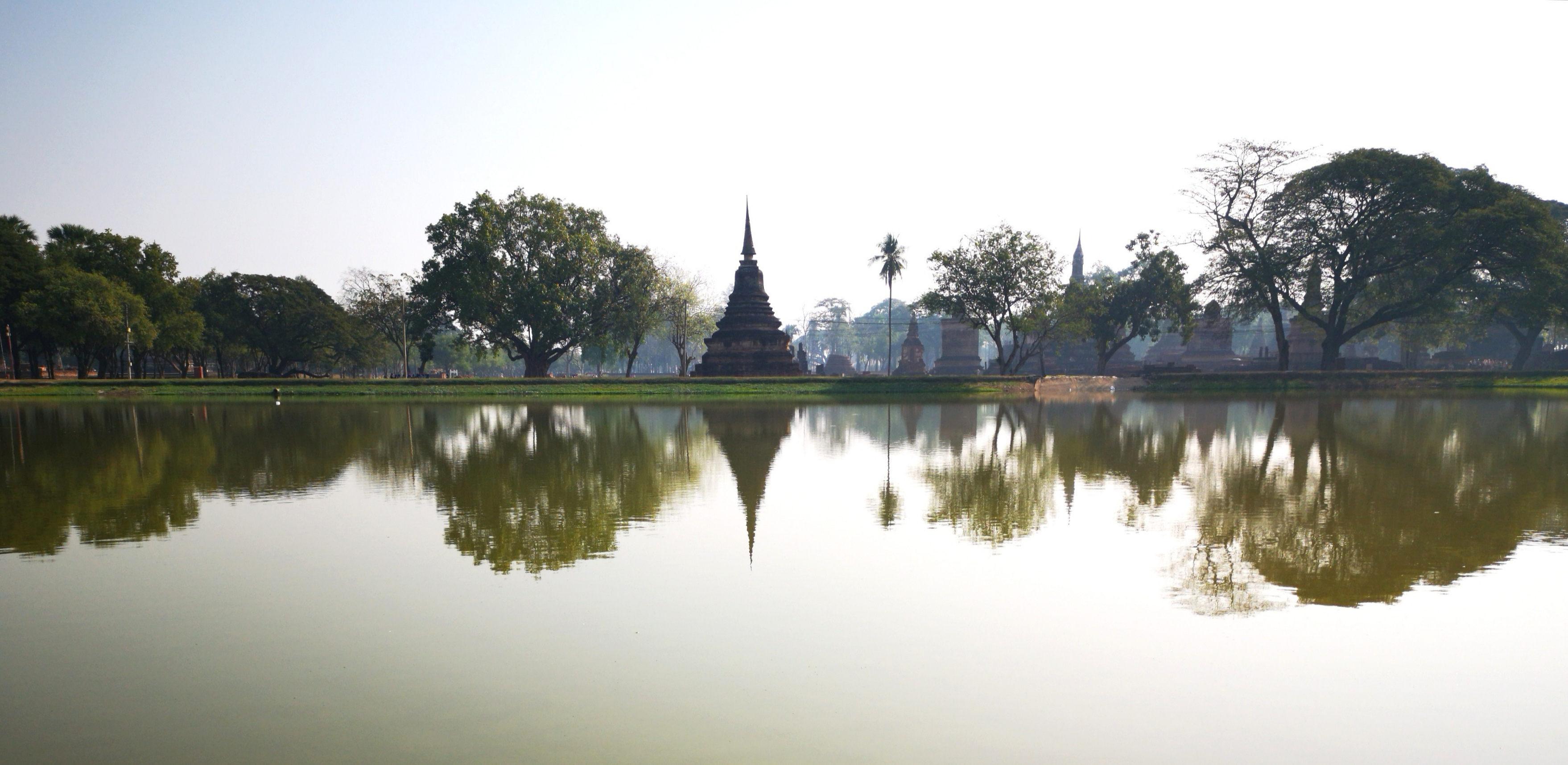 Lago nel parco storico di Sukhothai